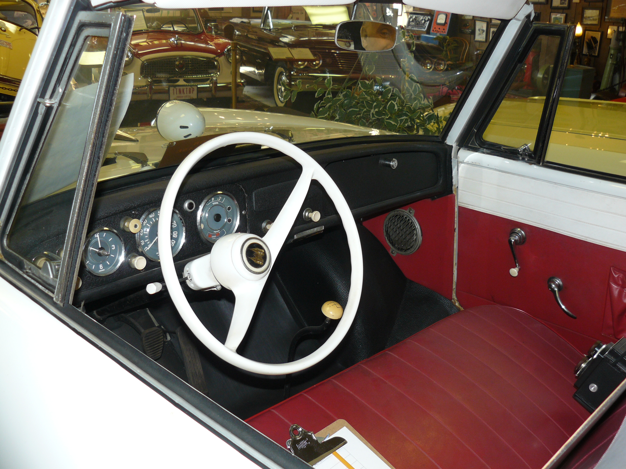 Canton Muséum 2013.